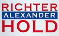 Richter Alexander Hold Logo